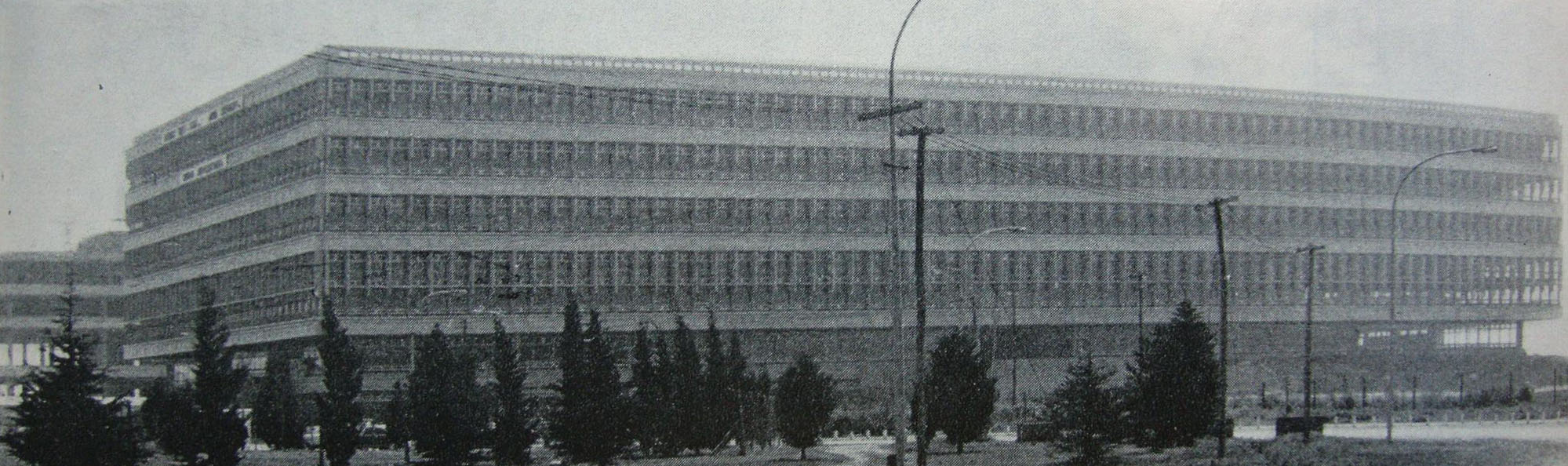 Vista de la Ciudad Universitaria de la Universidad de Buenos Aires desde su camino de acceso. En primer plano, el edificio de la Facultad de Ciencias Exactas y Naturales. A su izquierda, la Facultad de Arquitectura y Urbanismo en construcción. Buenos Aires, Argentina.